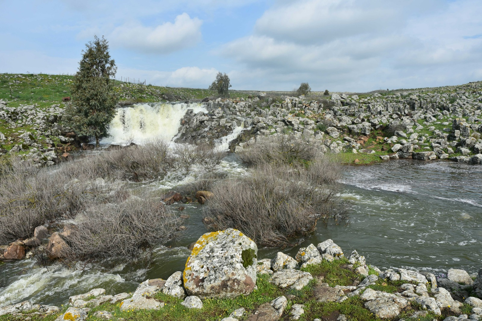 מפל ובריכה.המים זורמים בחורף וממלאים את הבריכה לעומק של 2.5. באביב בנוסף למים יש אחלה פריחה, מומלץ מאוד. בקיץ אין מים וגם אין צל ככה שהמקום לא שווה את זה בקיץ.